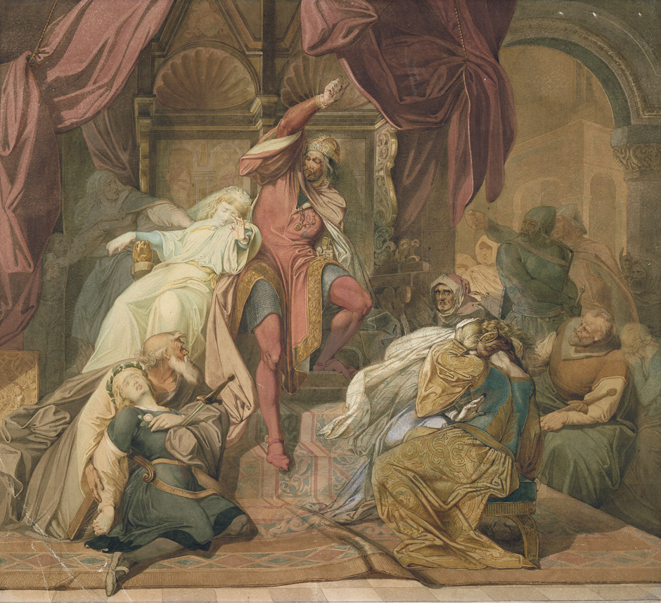 Des Sängers Fluch. Aquarell über schwarzem Stift. 50,5 x 57,2 cm